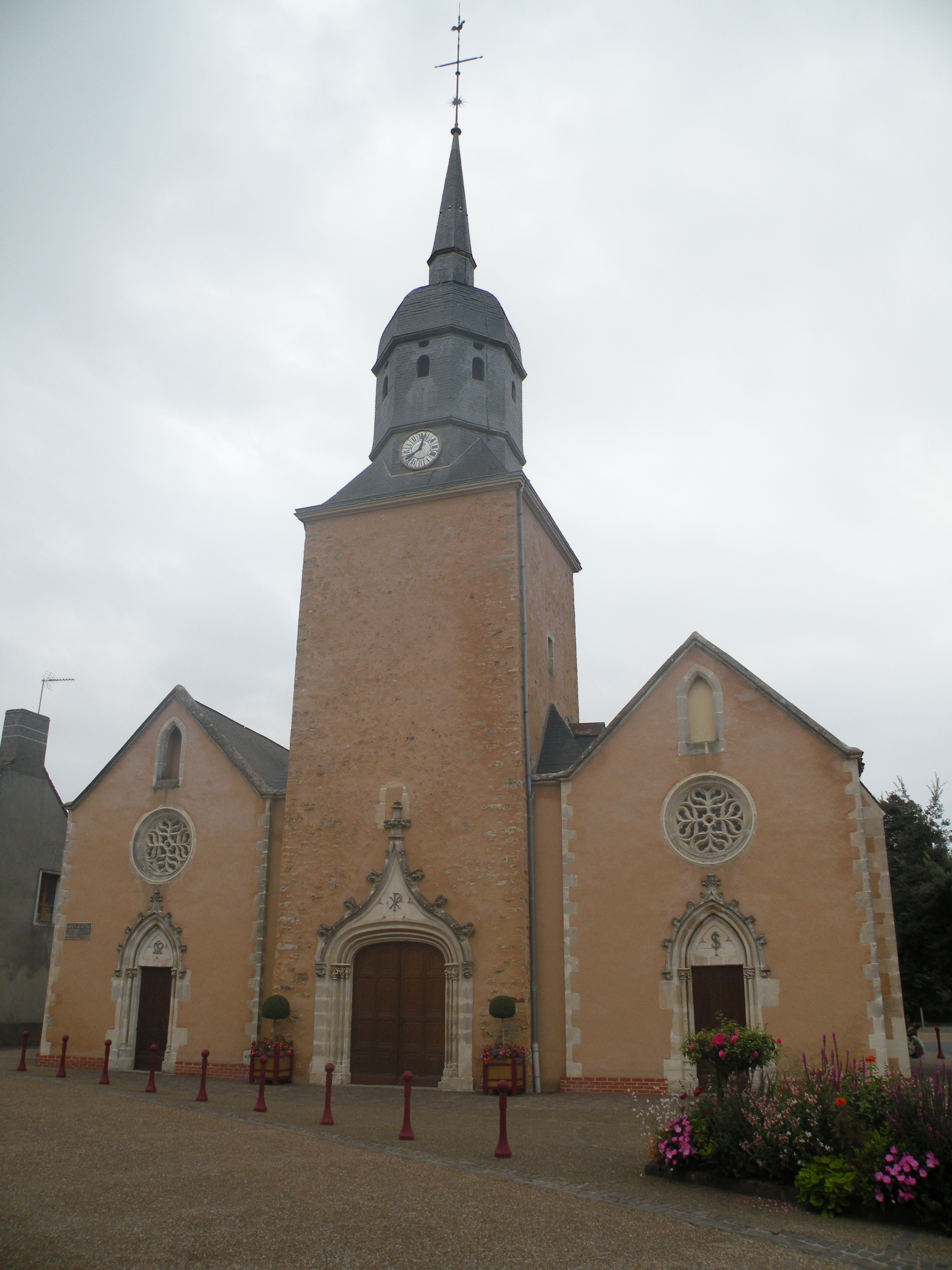 Façade ouest de l'église Saint-Martin de Beaufay.